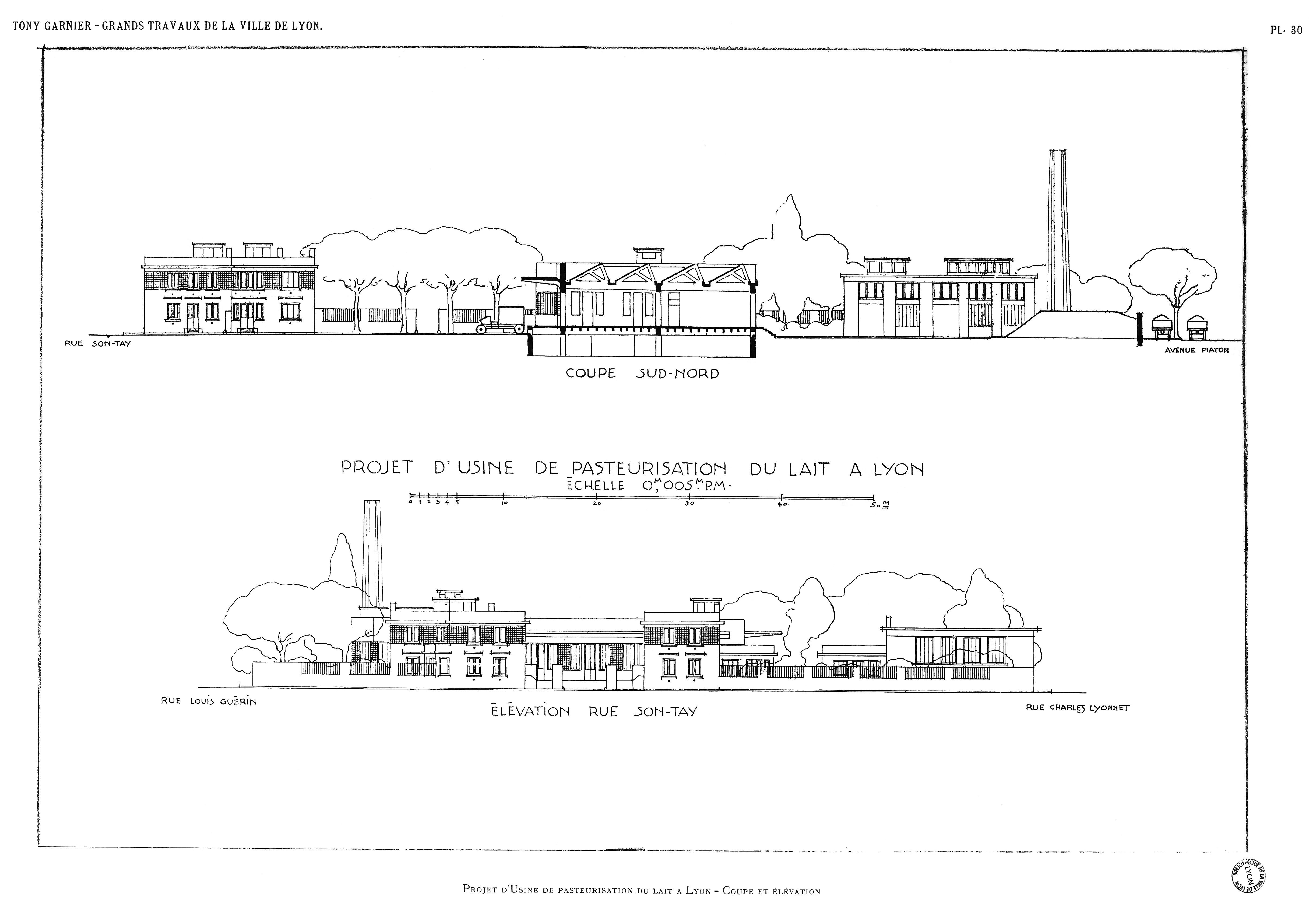 Projet d’une usine de pasteurisation du lait à Lyon : coupe et élévation par Tony Garnier (pl. 30) du recueil "Les grands travaux de la ville de Lyon [Livre] : études, projets et travaux exécutés (hôpitaux, écoles, postes, abattoirs, habitations en commun, stade, etc.)" en 1921. Version en noir et blanc.